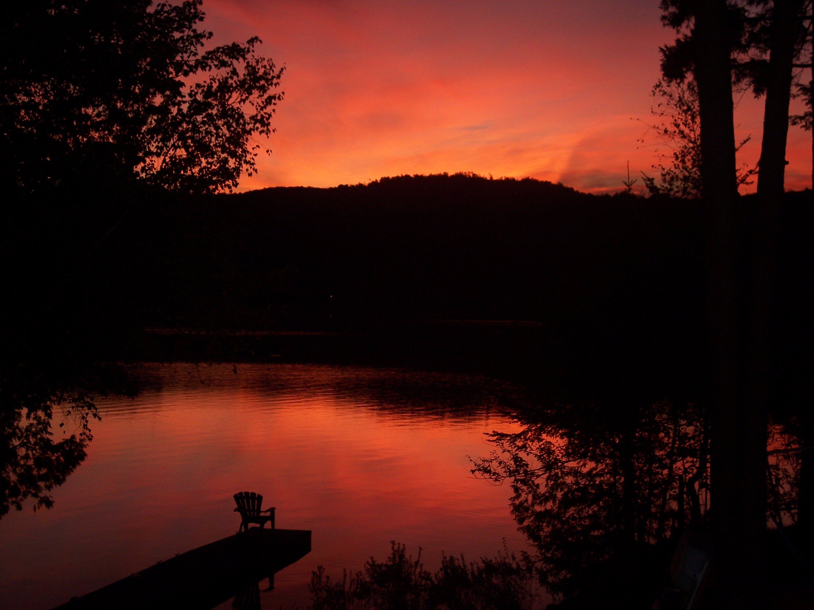 Le lac lovering très tôt le matin